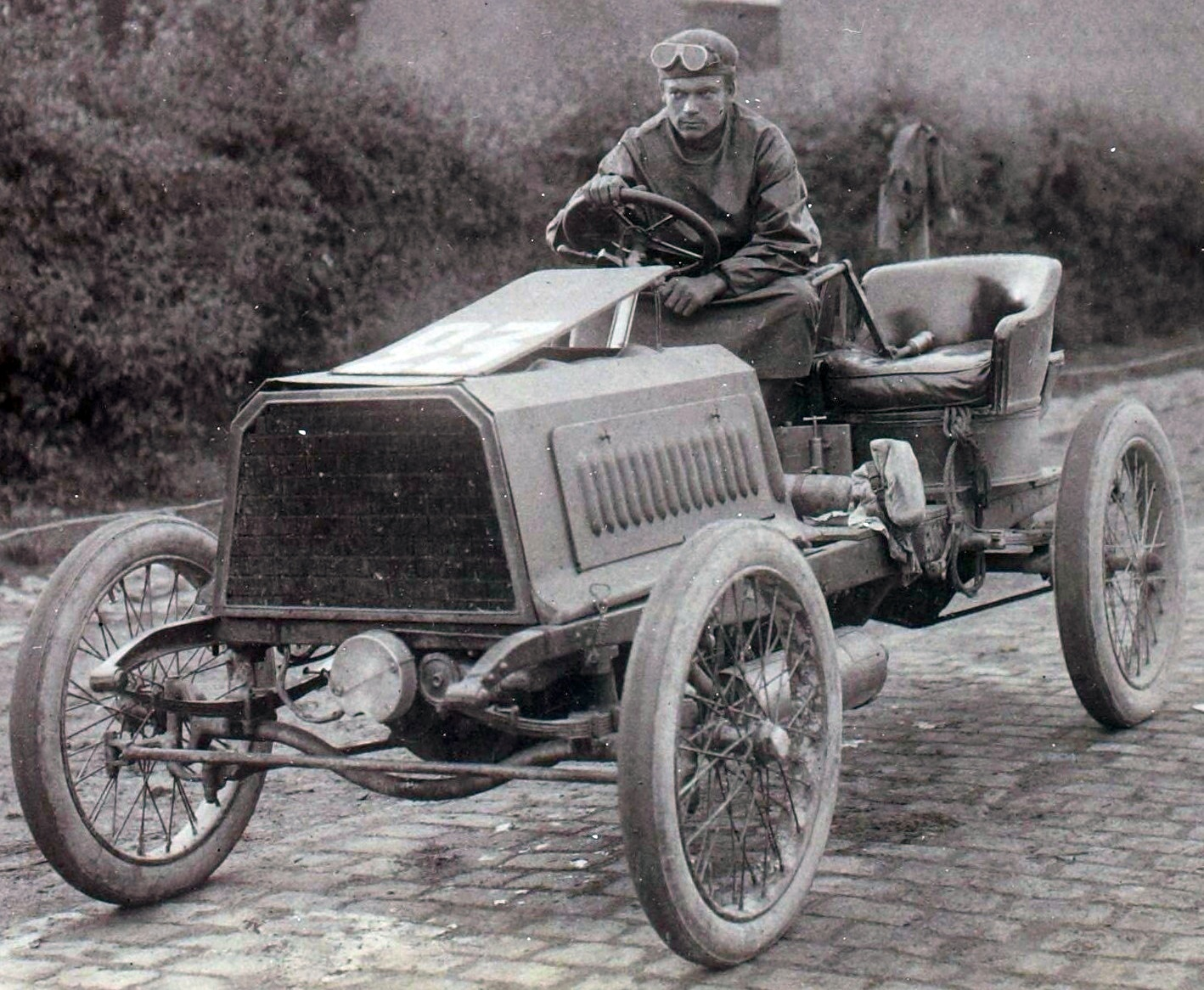 [Collection Jules Beau. Photographie sportive] : T. 27. AnnÃ©e 1904 / Jules Beau : F. 28v. [Circuit des Ardennes, Bastogne, 25 juillet 1904]